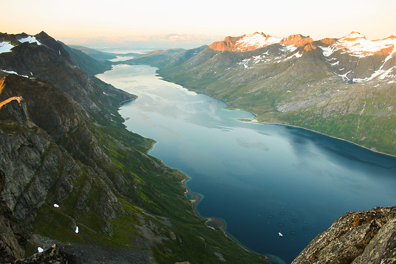 Ersfjord sett fra Skamtinden.